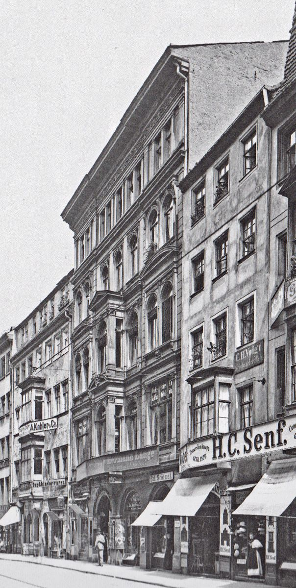 Der Kopfbau von Löhrs Hof Reichsstraße 14 (mittleres Gebäude)